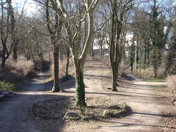 Der Wall vom Rathenower Tor nach Südwesten